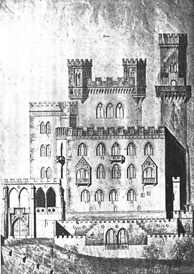 Hambacher Schloss, Entwurf von Professor Voit